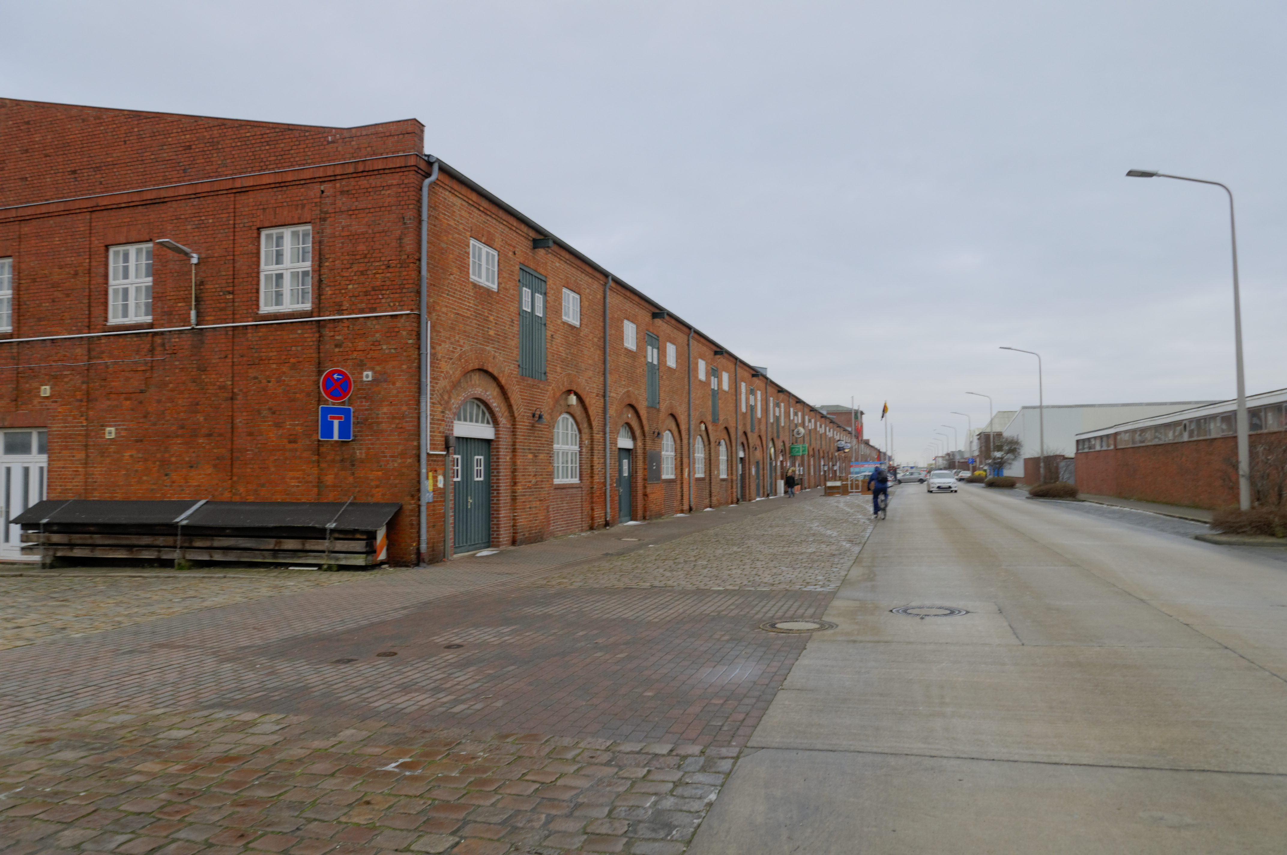 Bilder für die Organisation der AdminCon 2016